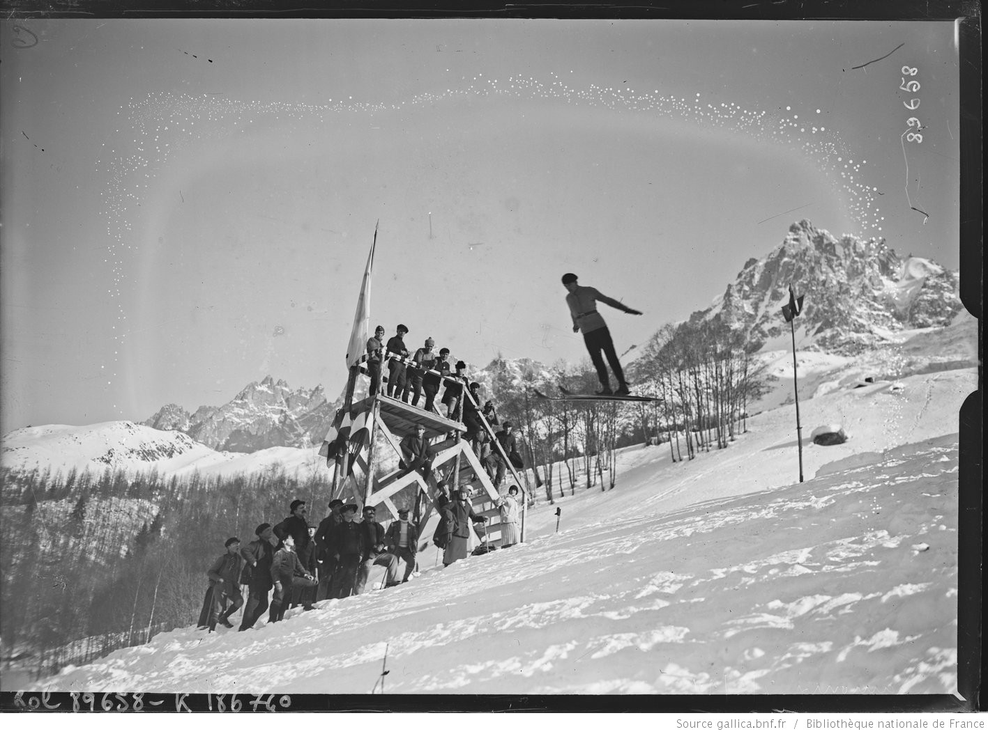 Chamonix, 2/2/24, [Martial] Payot, français, [combiné nordique, saut à ski] : [photographie de presse] / [Agence Rol]